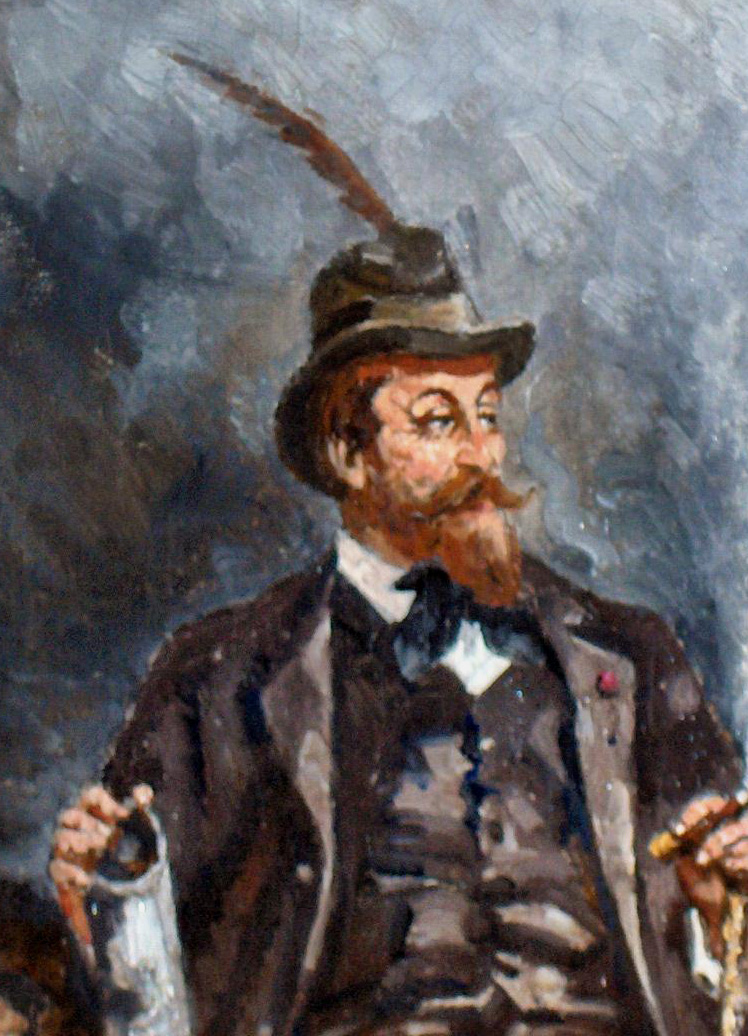 Portret van de kunstschilder Alfred Verwee; detail uit "Le vainqueur du match" (1895) ; gemeentelijk patrimonium Knokke-Heist, BelgIê